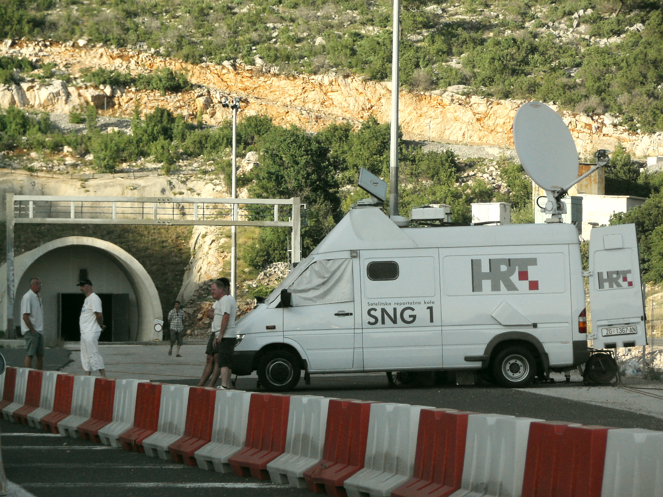 Wóz reporterski telewizji HRT nadający z chorwackiej autostrady